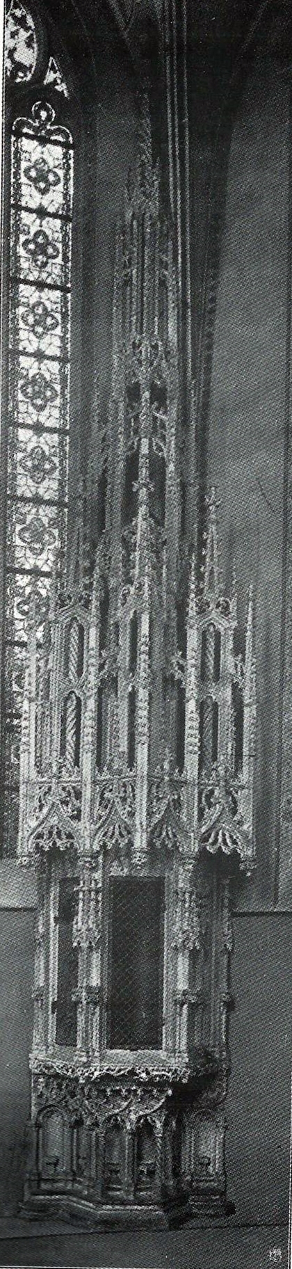 St. Martin Benninghausen, Salramentshäuschen